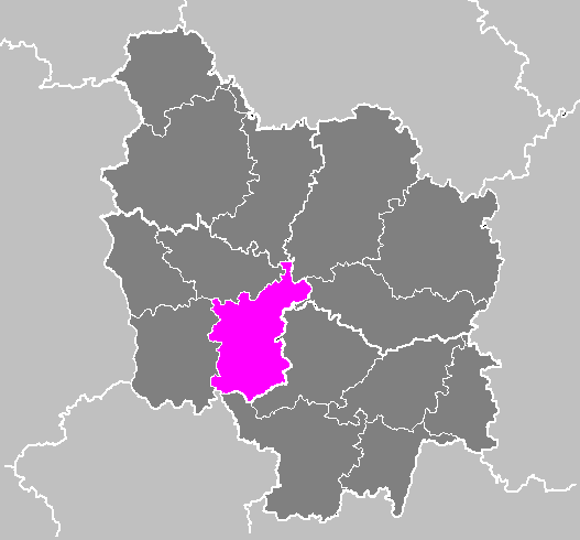 Maps of arrondissements and cantons of France: Arrondissement de Château-Chinon.PNG (Région Bourgogne)